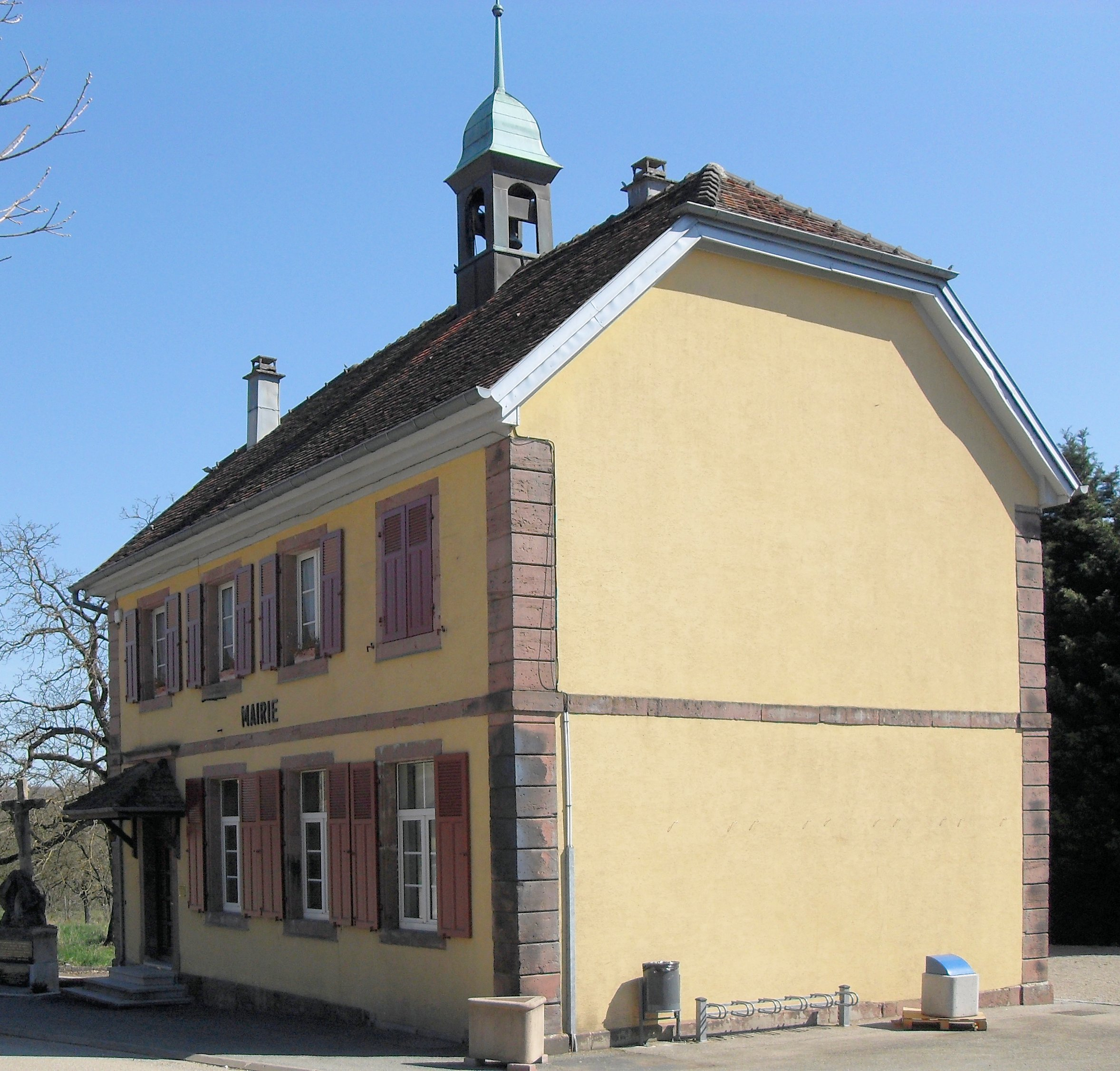 La mairie de Sternenberg